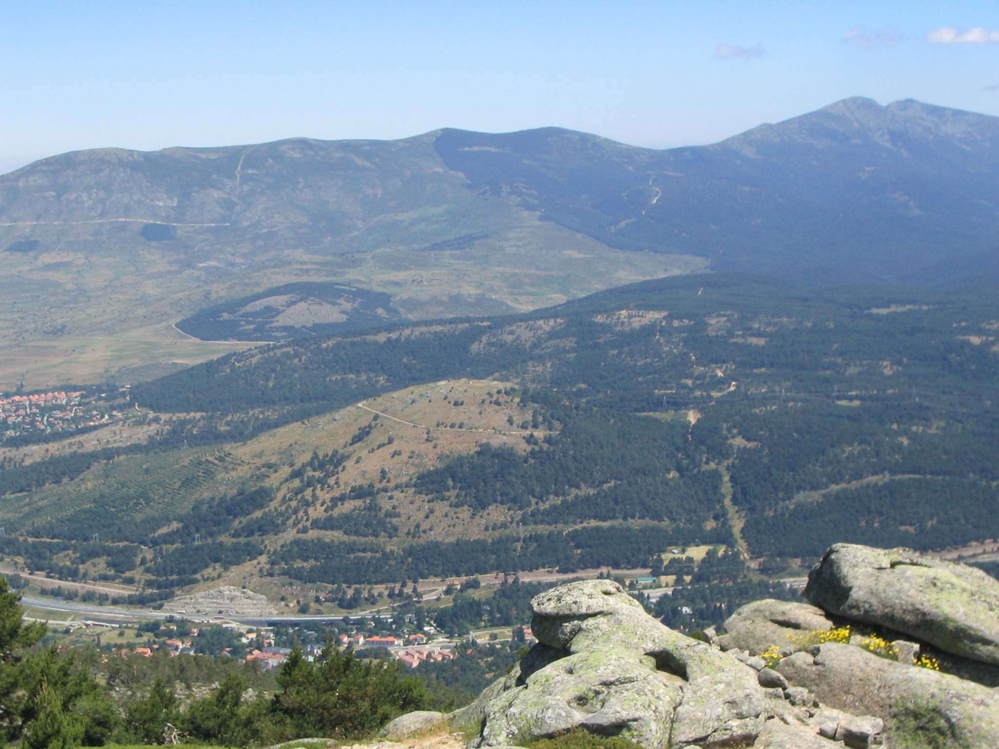 Monte Cabeza Reina. El Espinar, Segovia España.